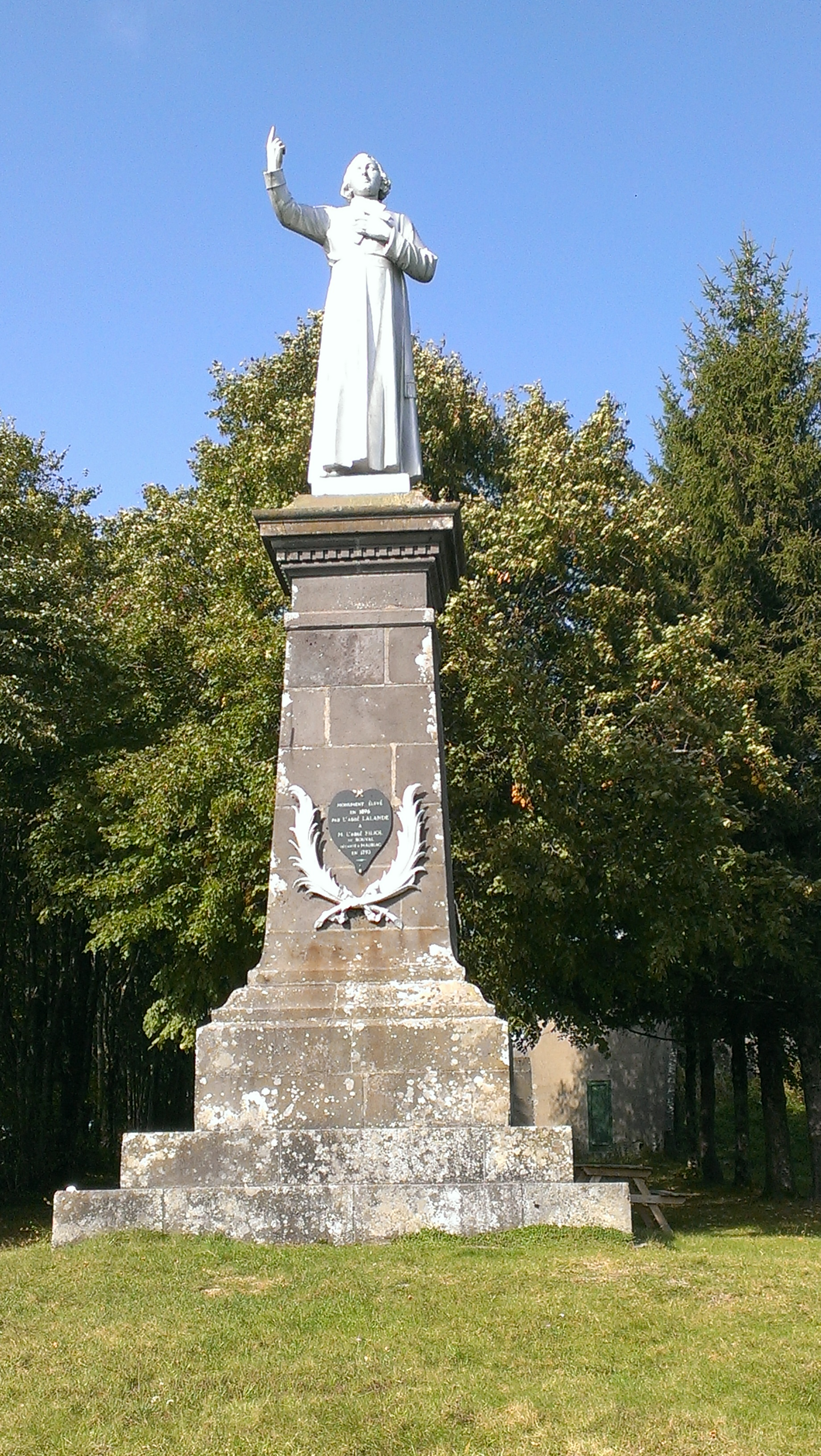 Statue d'un prêtre réfractaire guillotiné à Mauriac derrière l'église Notre Dame des Miracles, originaire de la commune de Barriac-les-Bosquets où une statue a été érigée